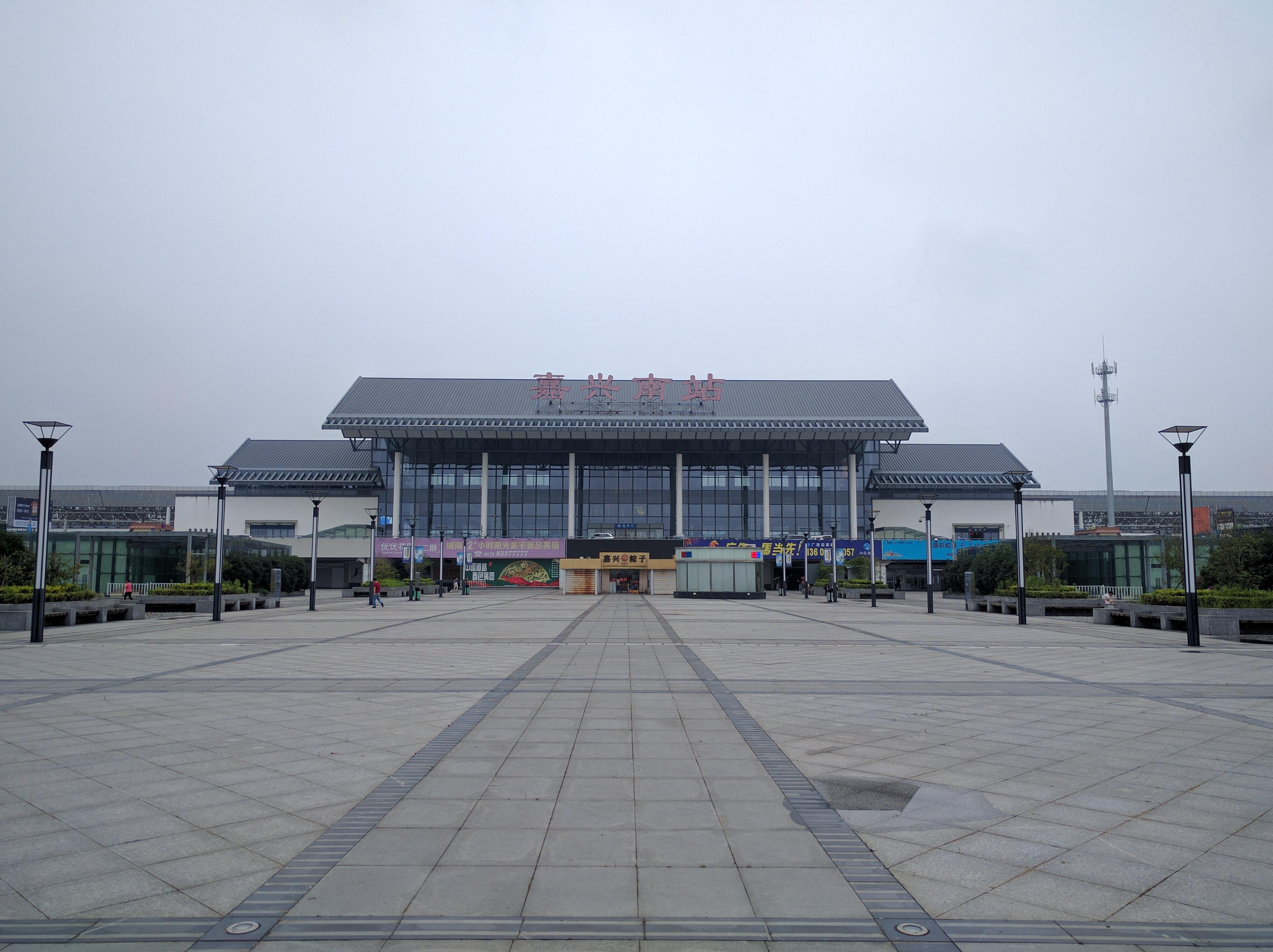 中文（中国大陆）: 嘉兴南站全景